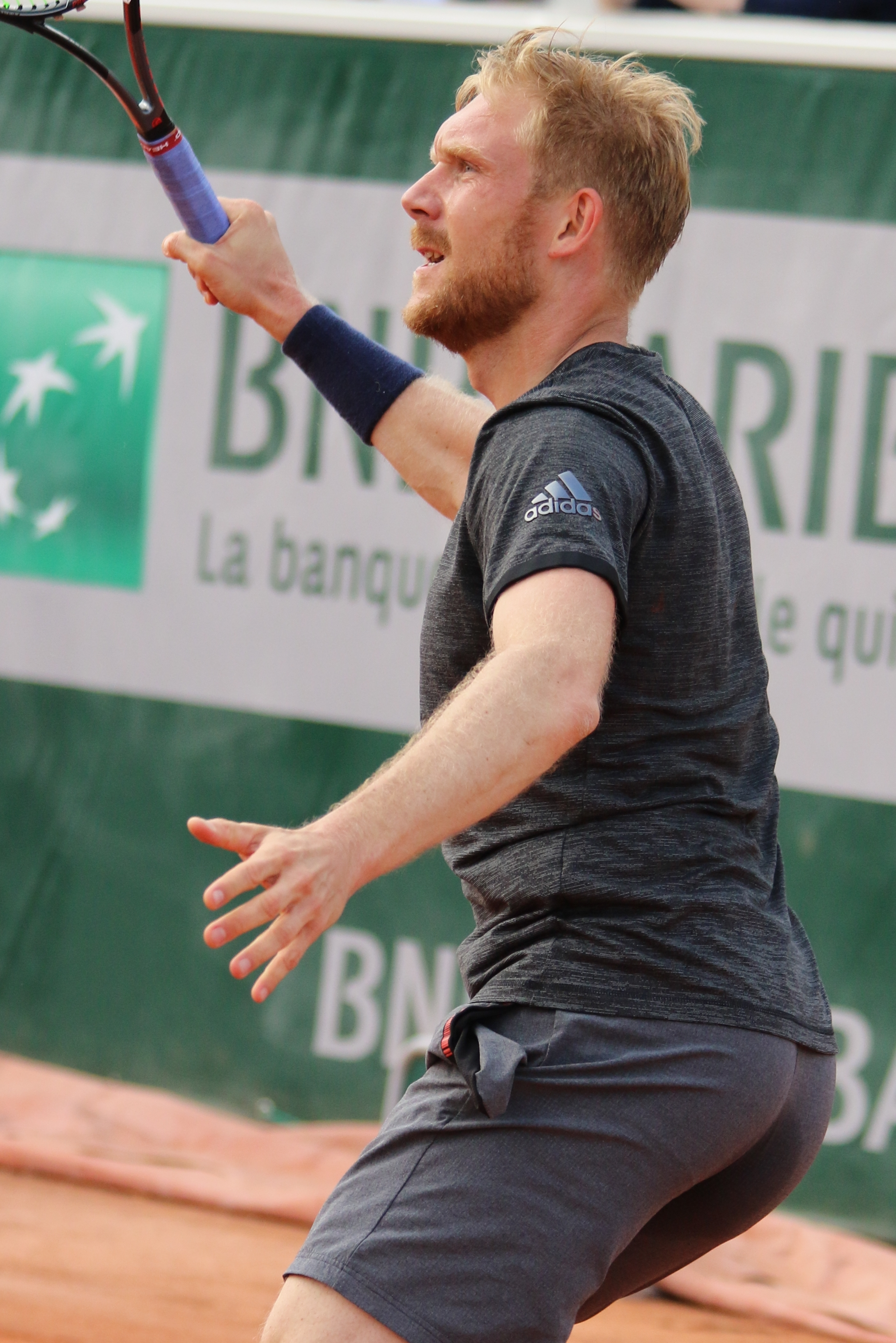 Bachinger RGQ19 (2)